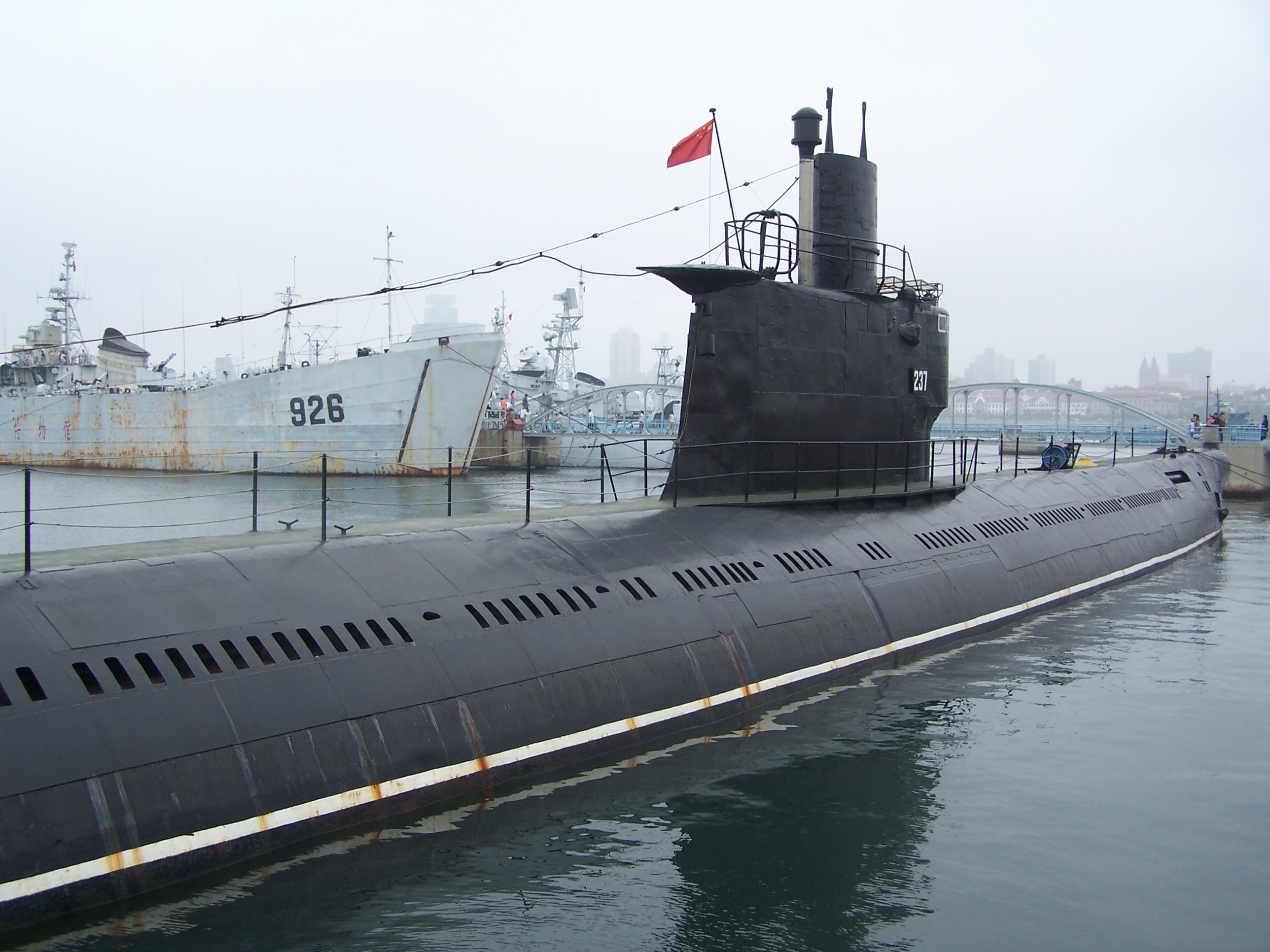 摄于青岛海军博物馆 Photo d'un sous-marin classe Romeo de la marine chinoise pris au Musée naval de Qingdao.